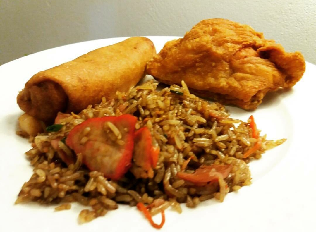 Versión jpg del archivo Archivo:Comida china en CR.png